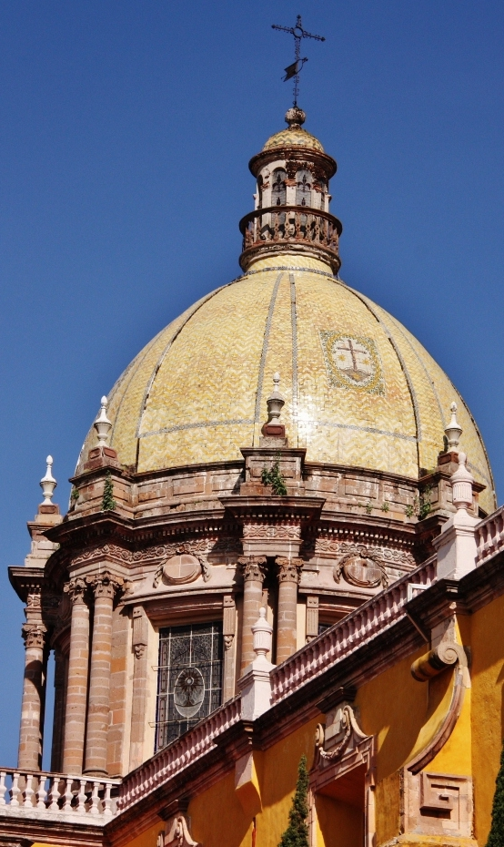 Templo de la Virgen del Carmen, Celaya, Guanajuato, México